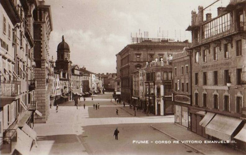 korzo, nekad